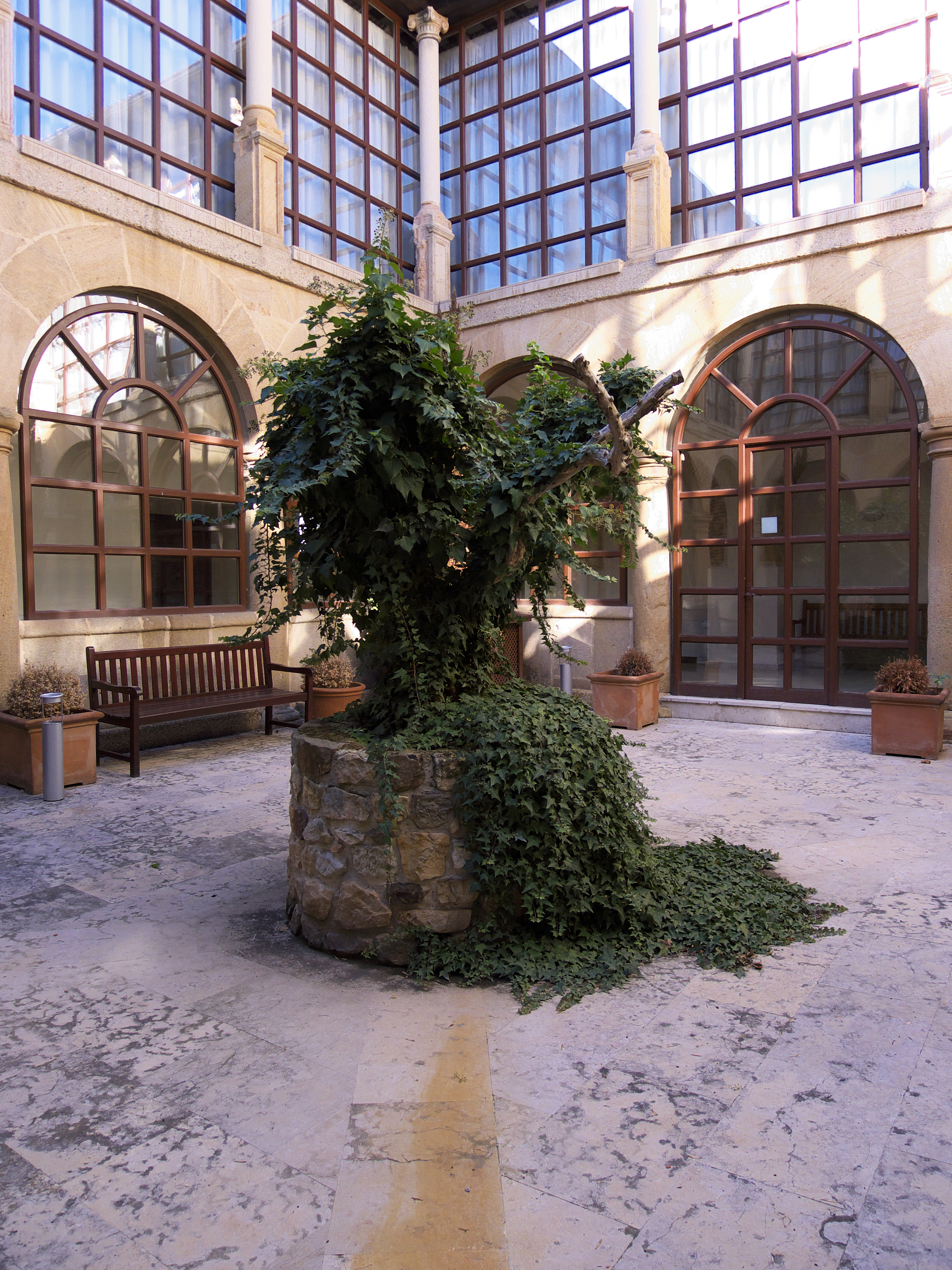 Patio del convento de los mercedarios en Soria